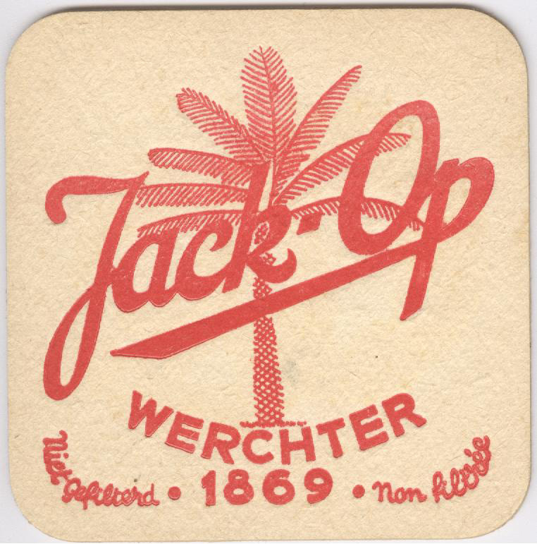 Bierviltje Jack-Op - Brouwerij Palmboom - Werchter - Rotselaar - Vlaams-Brabant - Vlaanderen - België